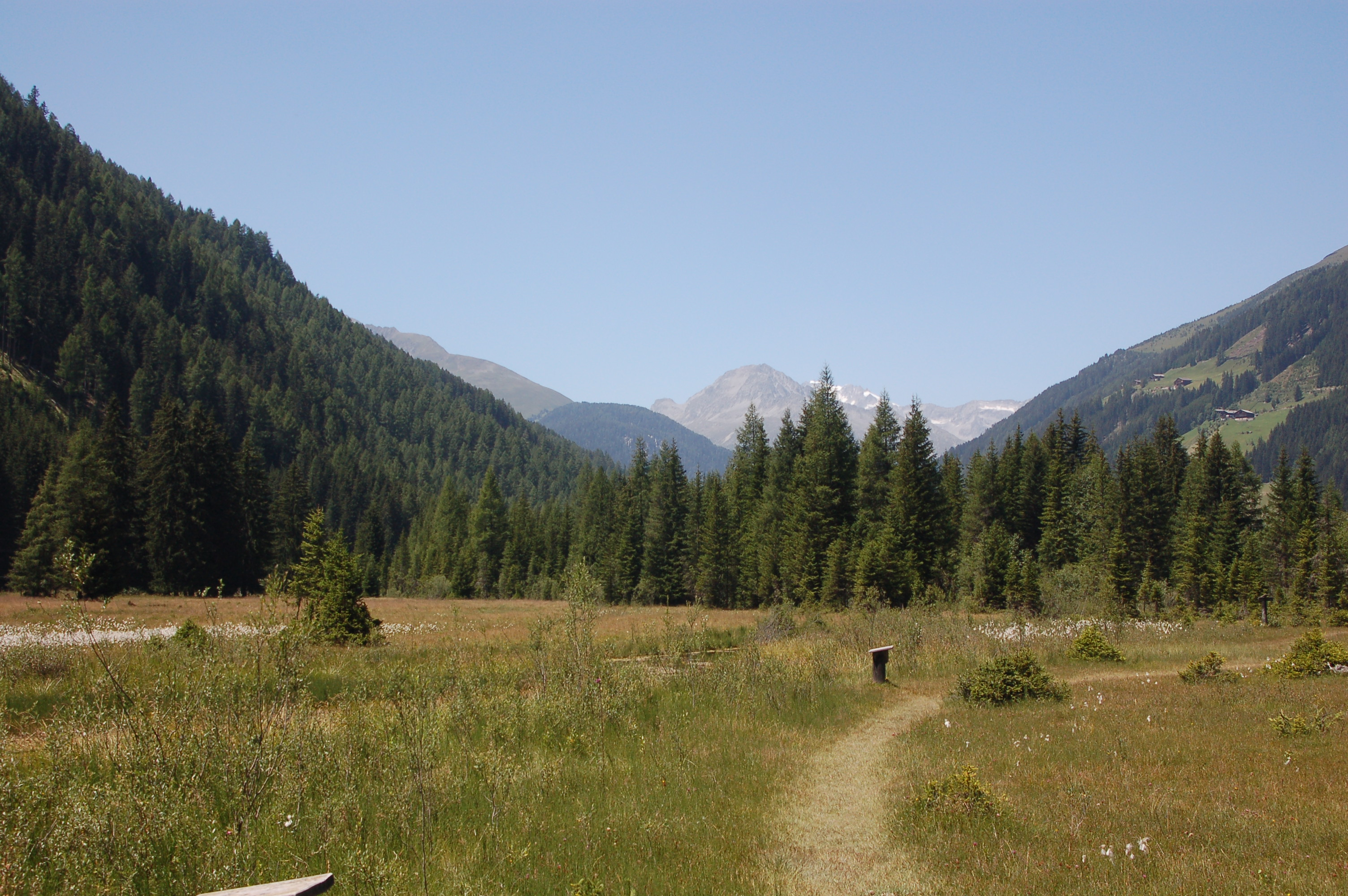 Überschwemmungsgebiet Bruggeralmbach in der Gemeinde St. Jakob in Defereggen